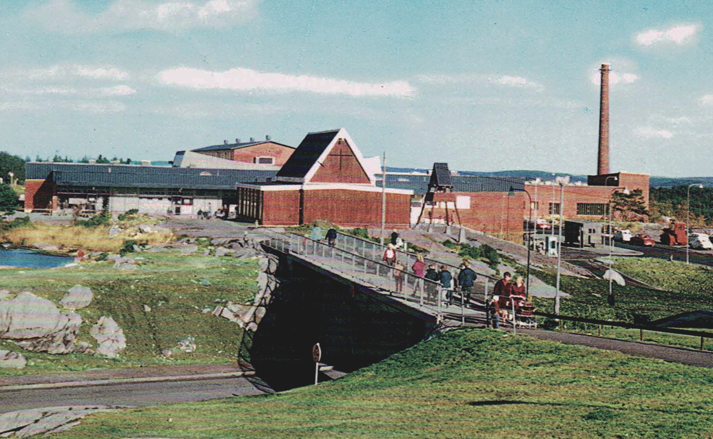 Länsmansgårdens första kyrka